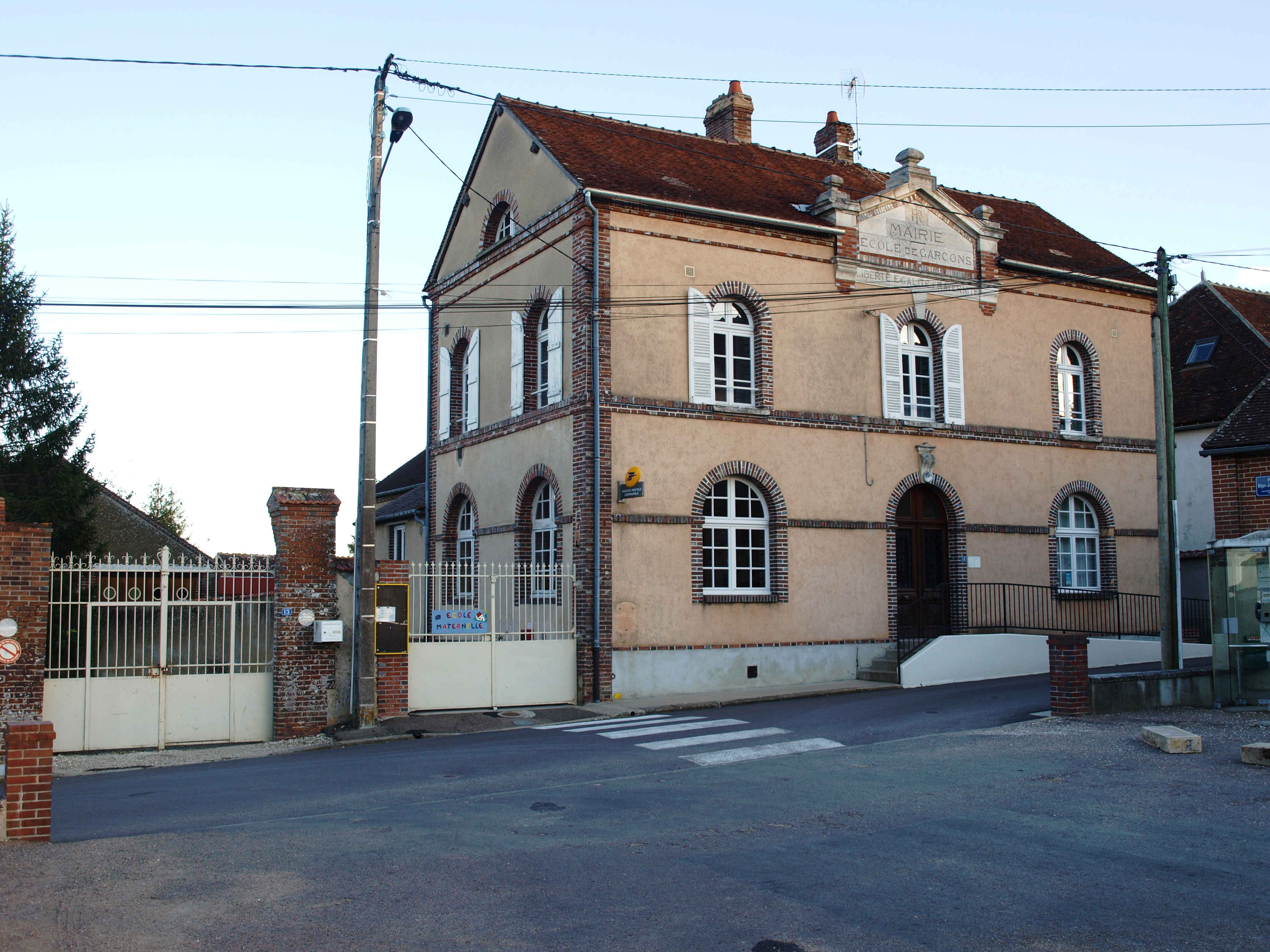 Saint-Aubin-Château-Neuf (Yonne, France) ; la mairie - école maternelle.